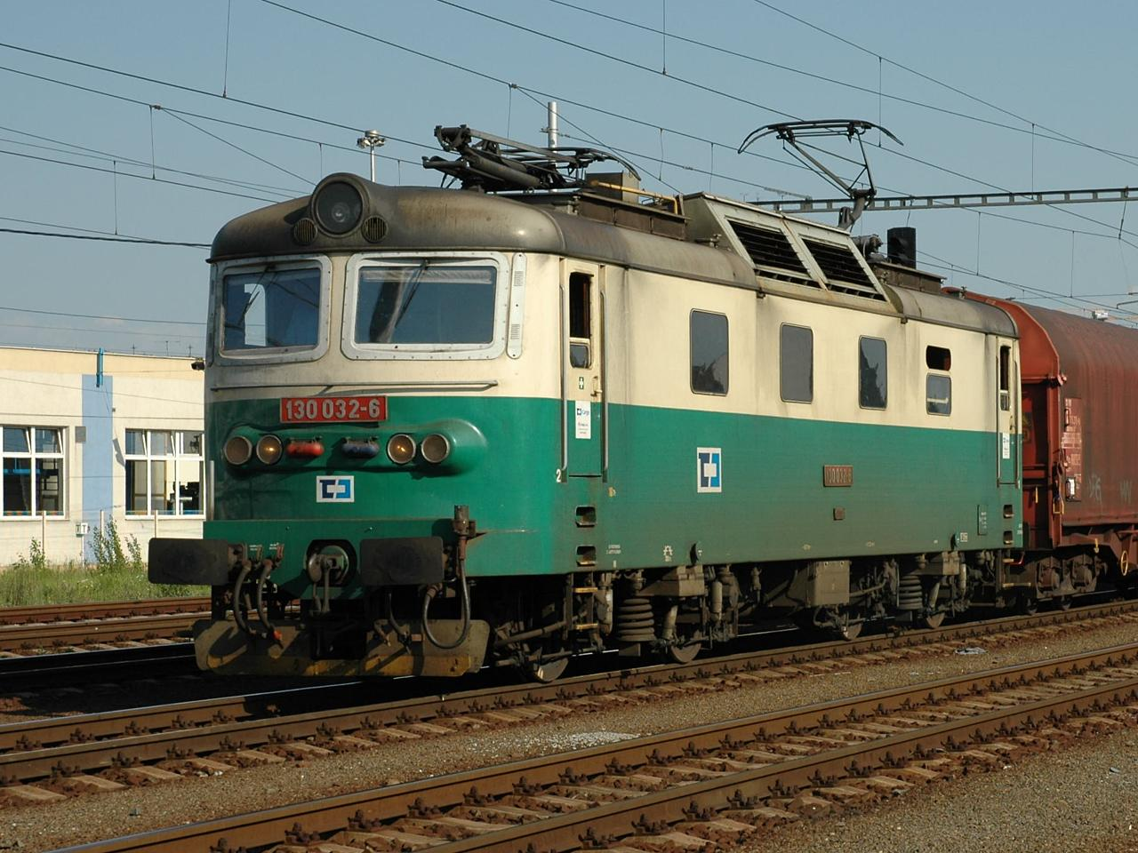 Lokomotiva 130.032 dopravce ČD Cargo, Ostrava báňské nádraží VOK